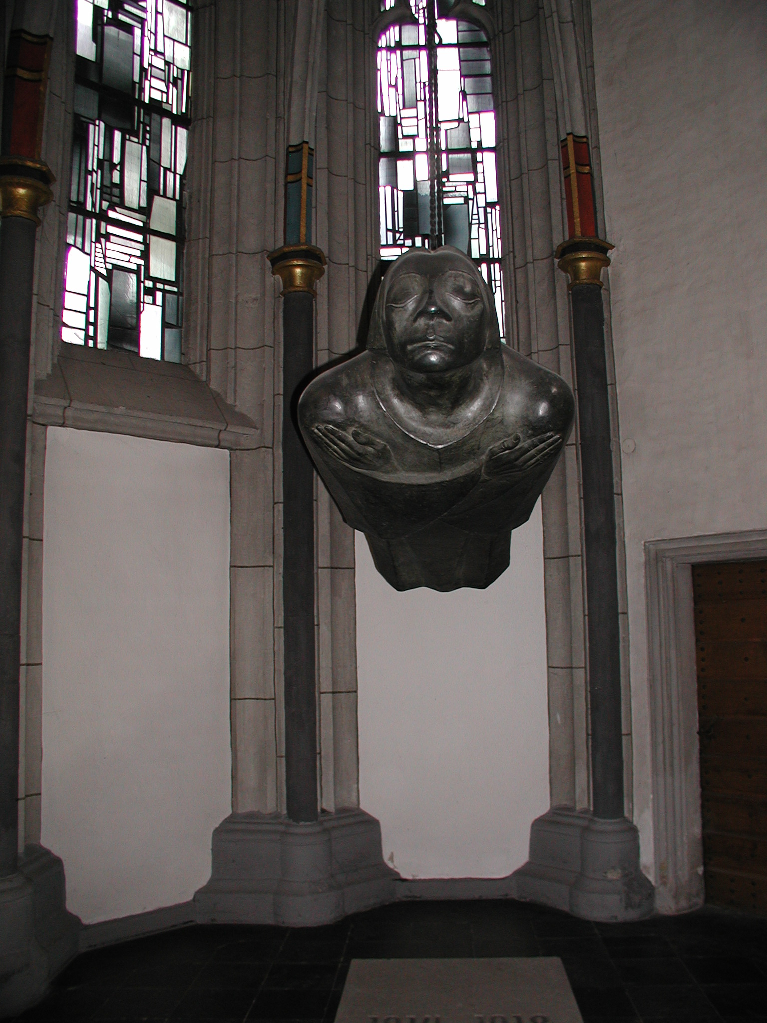 Köln, Antoniterkirche. Schwebender Engel, Abguss des Originals von Ernst Barlach aus dem Jahr 1927